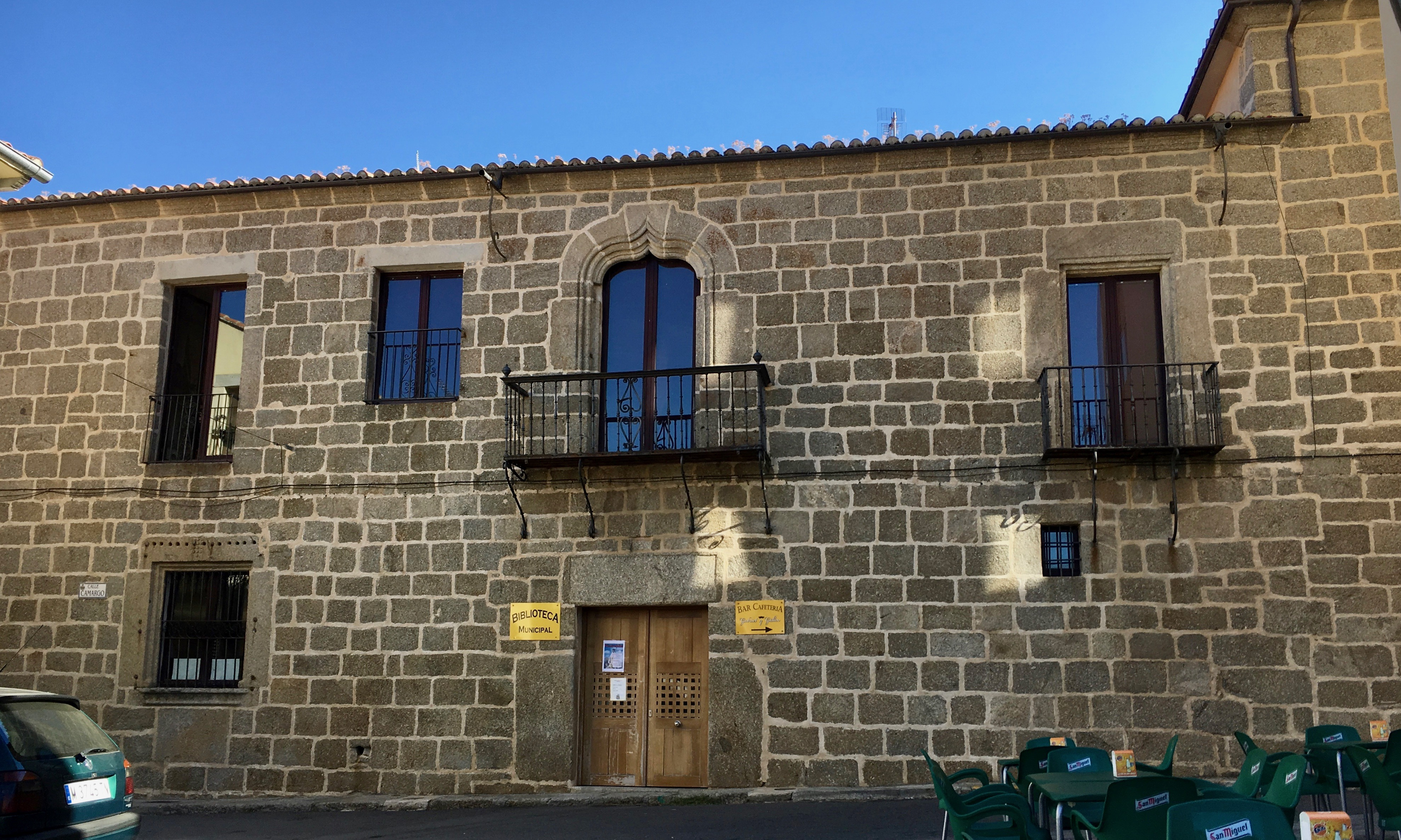 Casa de Gabriel y Galán | Fachada principal